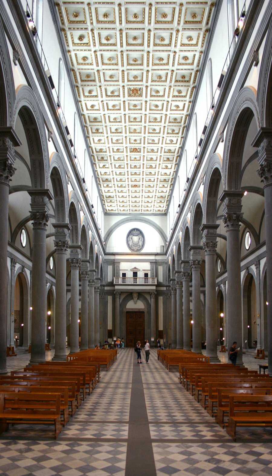 Einblick ins Langhaus (Richtung Portal) der Basilica di San Lorenzo di Firenze. Around 1900. Today.